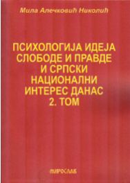 Мила Алечковић Николић - Психологија идеја слободе и правде и Српски национални интерес данас, 2. том